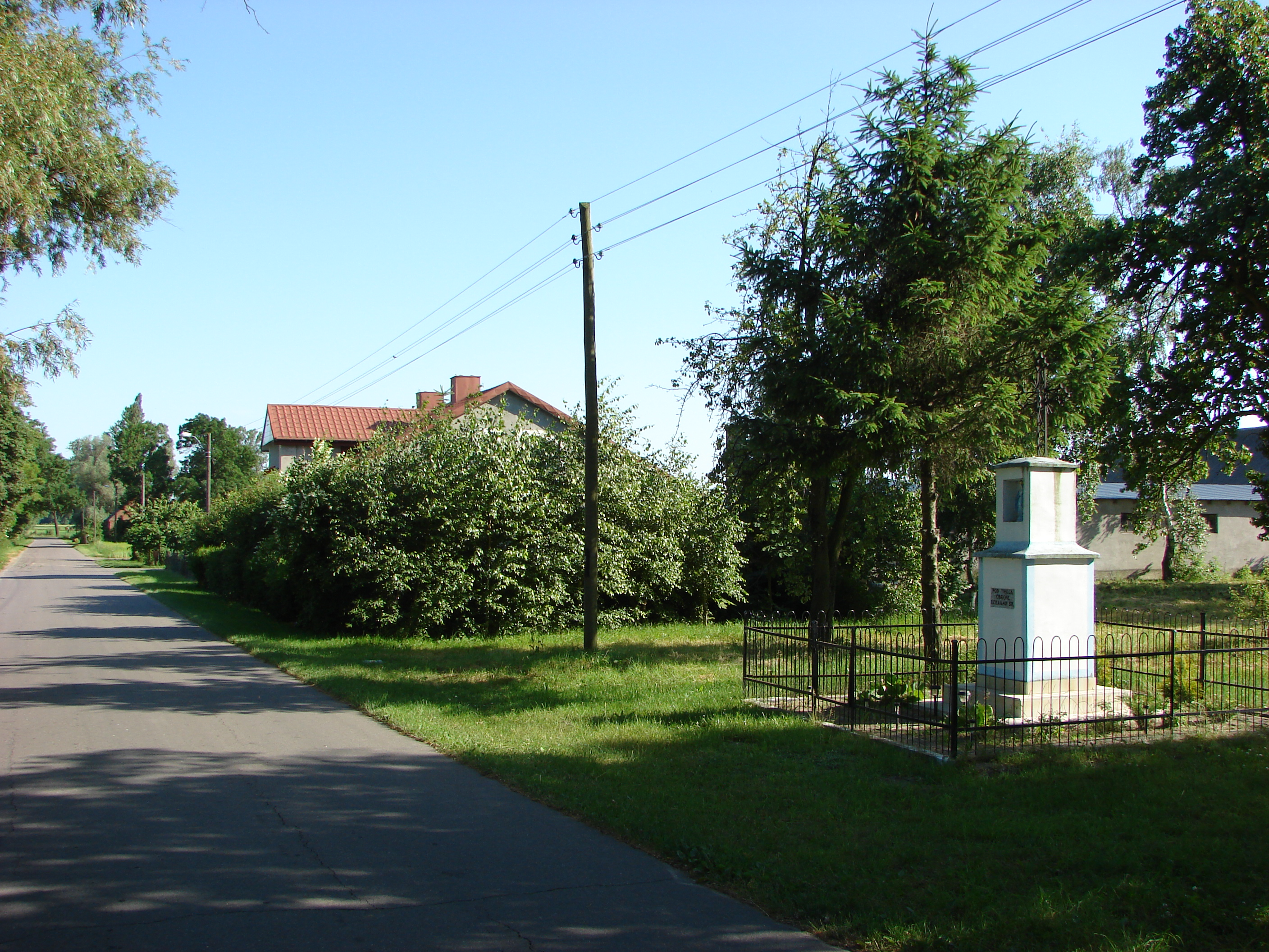 Skaszyn, przydrożna kapliczka